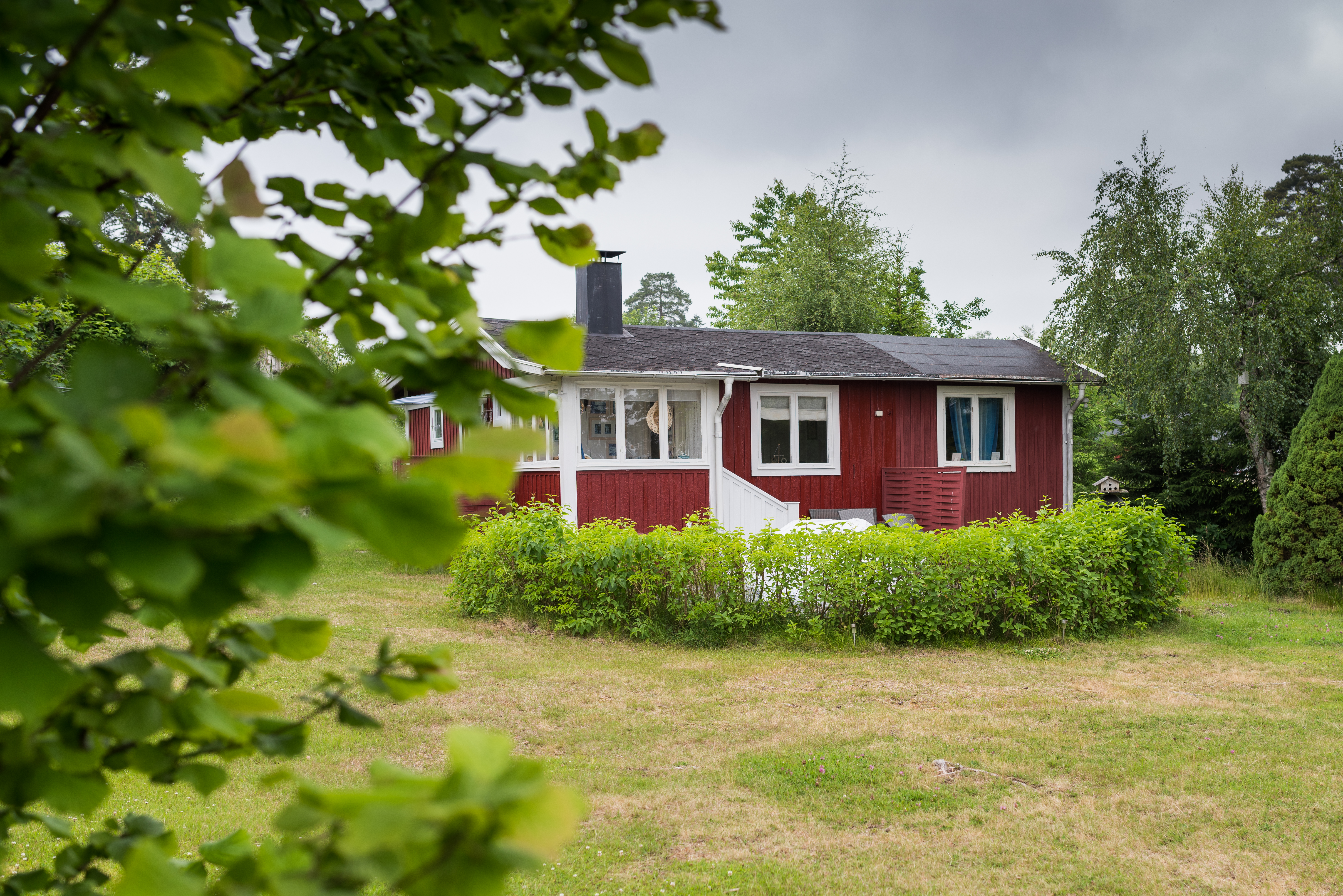 Midsummer Årsta Havsbad